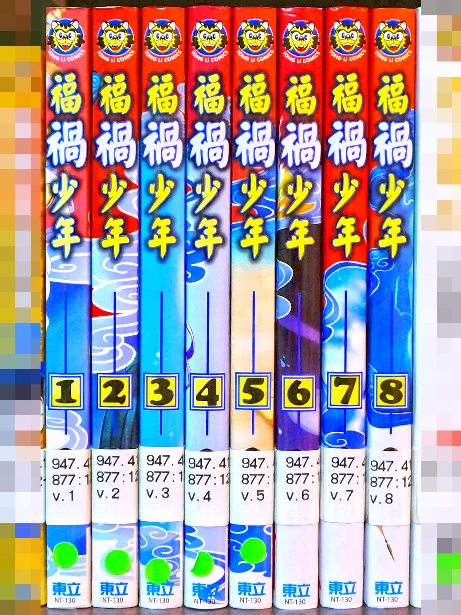 中華民國國家圖書館藝術暨視聽資料中心漫畫屋收藏的東立出版社《福禍少年》全套單行本書背。